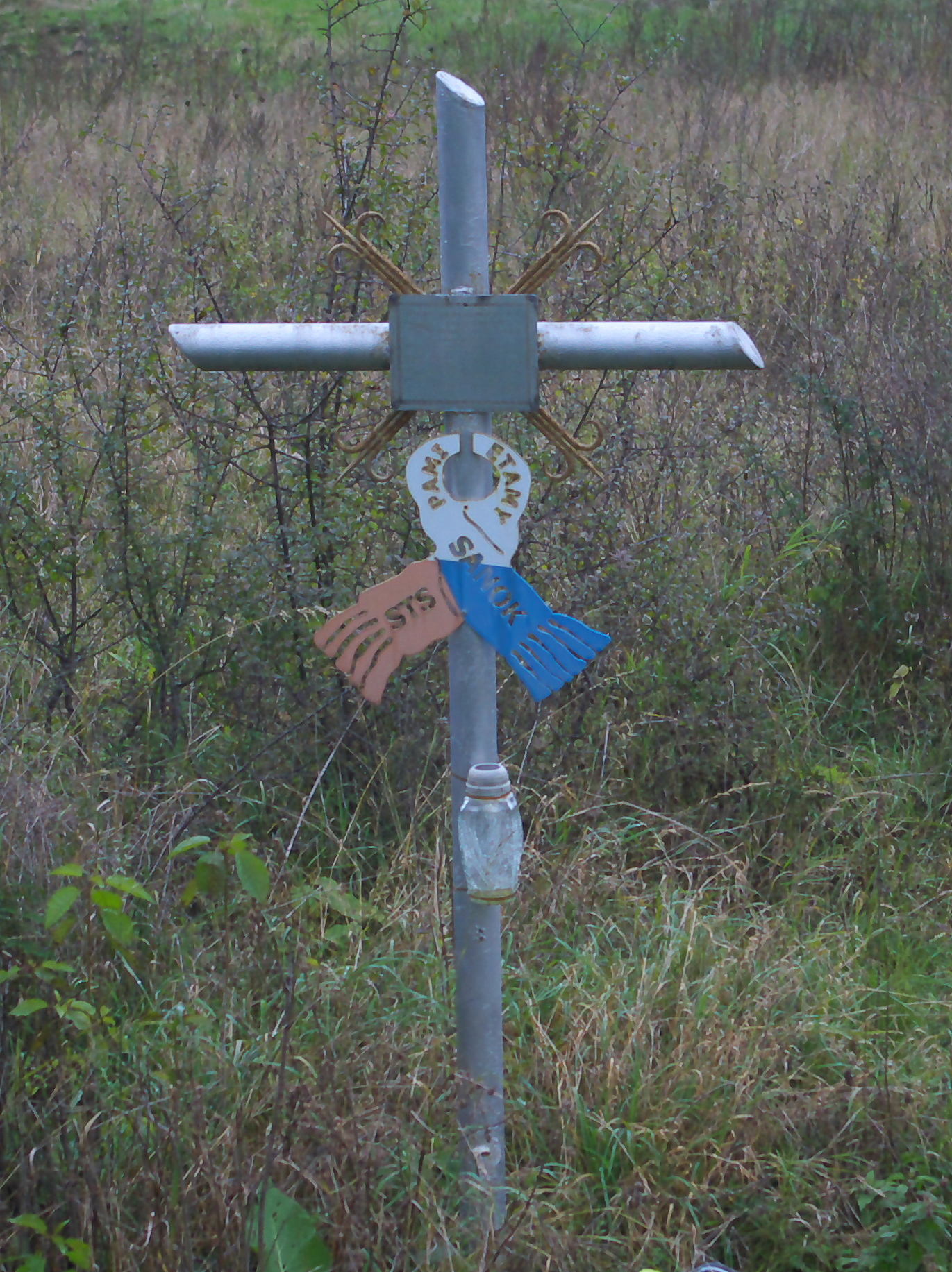 Gniewoszówka - krzyż przydrożny w miejscu wypadku drogowego autokaru wiozącego drużynę hokeja na lodzie STS "Autosan" Sanok z 23 stycznia 1995, w którym poniosły śmierć trzy osoby, w tym hokeista Piotr Milan.